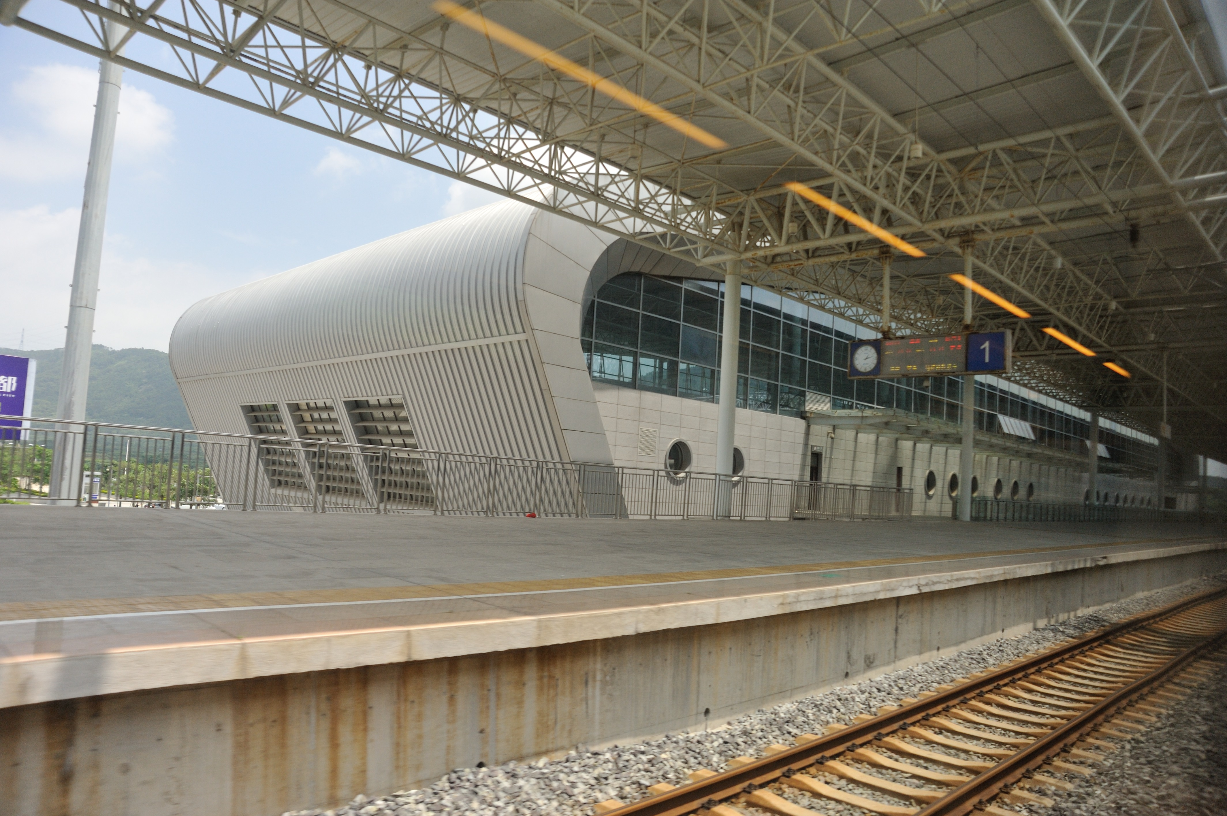 福清站站台